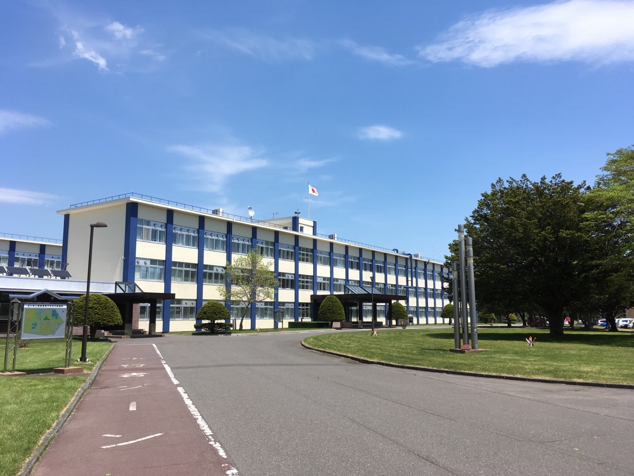 学校本校舎正門側から撮影した写真